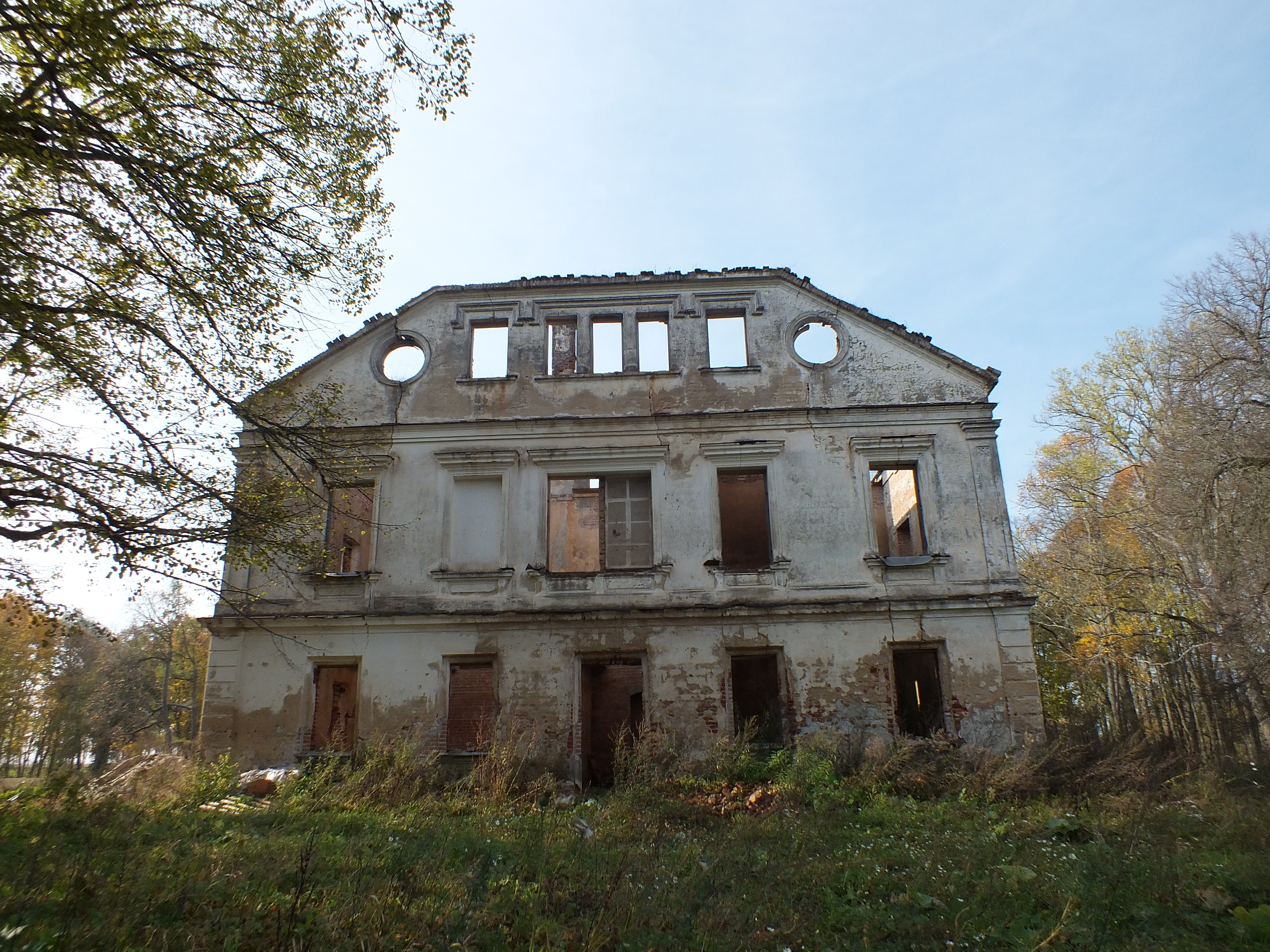 Alančių dvaro rūmai 2014 m. (XVI a.)